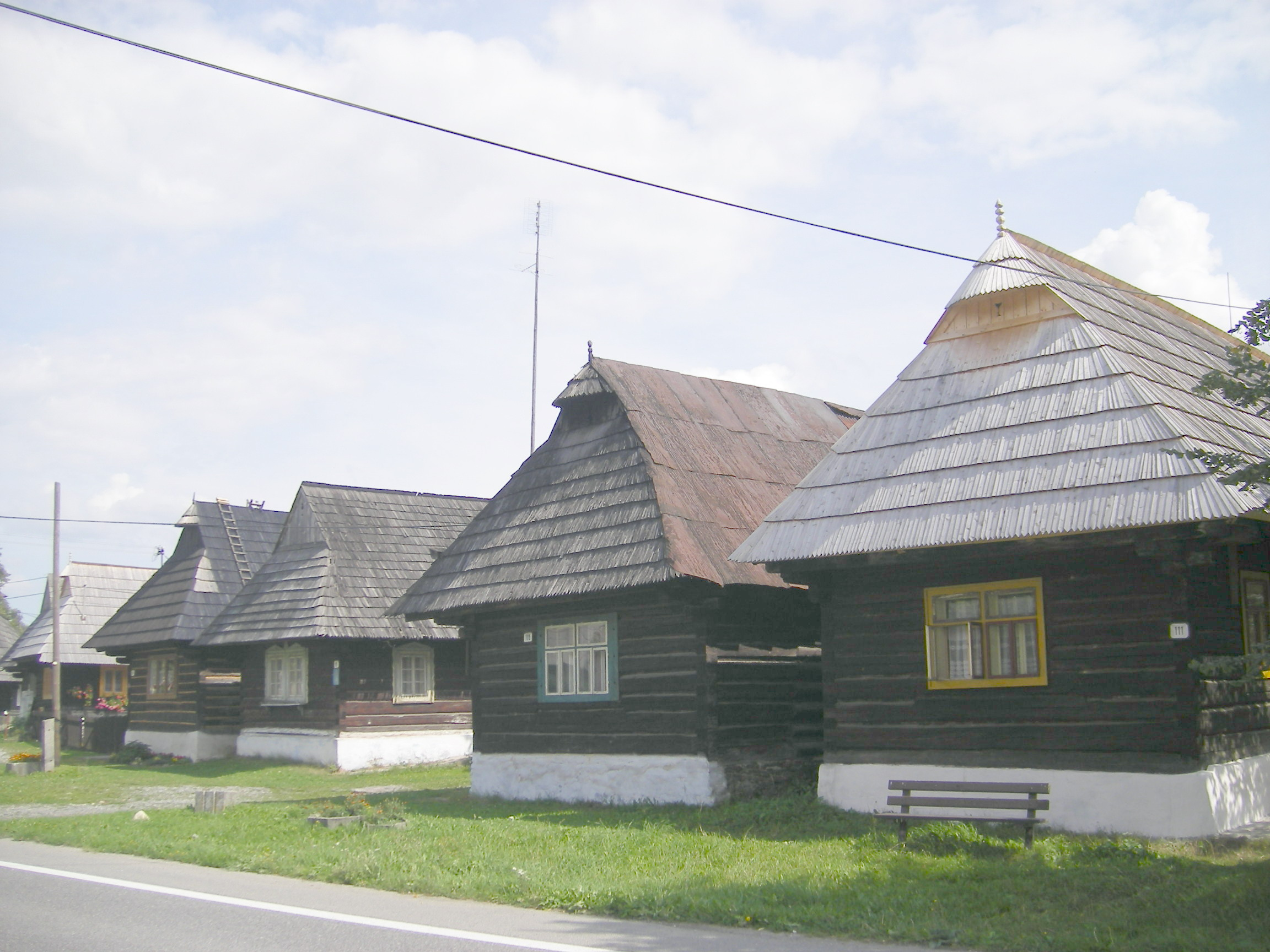 Podbiel, okres Tvrdošín